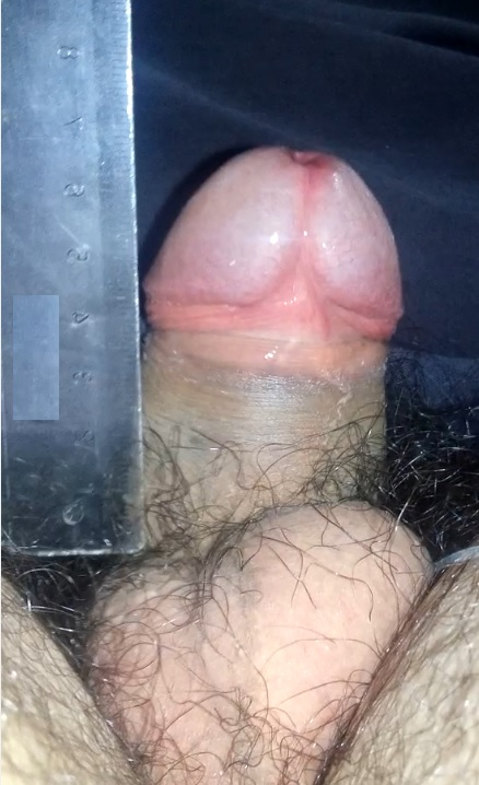 Micropene duro medido con una regla